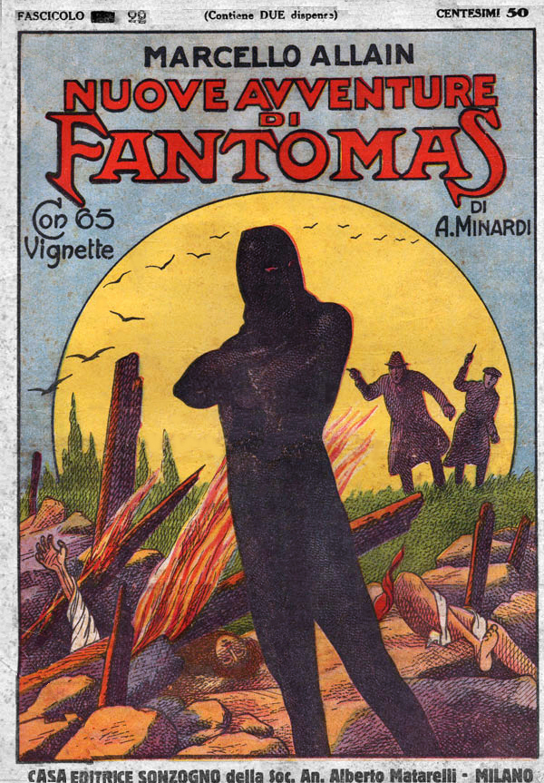 Marcel Allain, Nuove avventure di Fantomas, couverture illustrée d'Adriano Minardi, 1930.